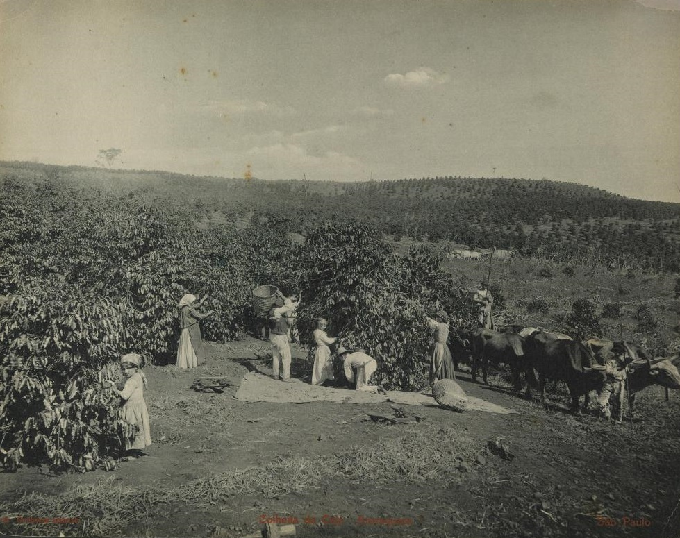 Colheita de café em Araraquara, São Paulo.